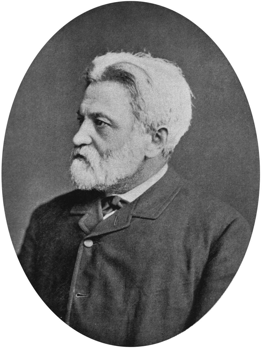 Carl Siegmund Franz Credé (23 December 1819 – 14 March 1892)